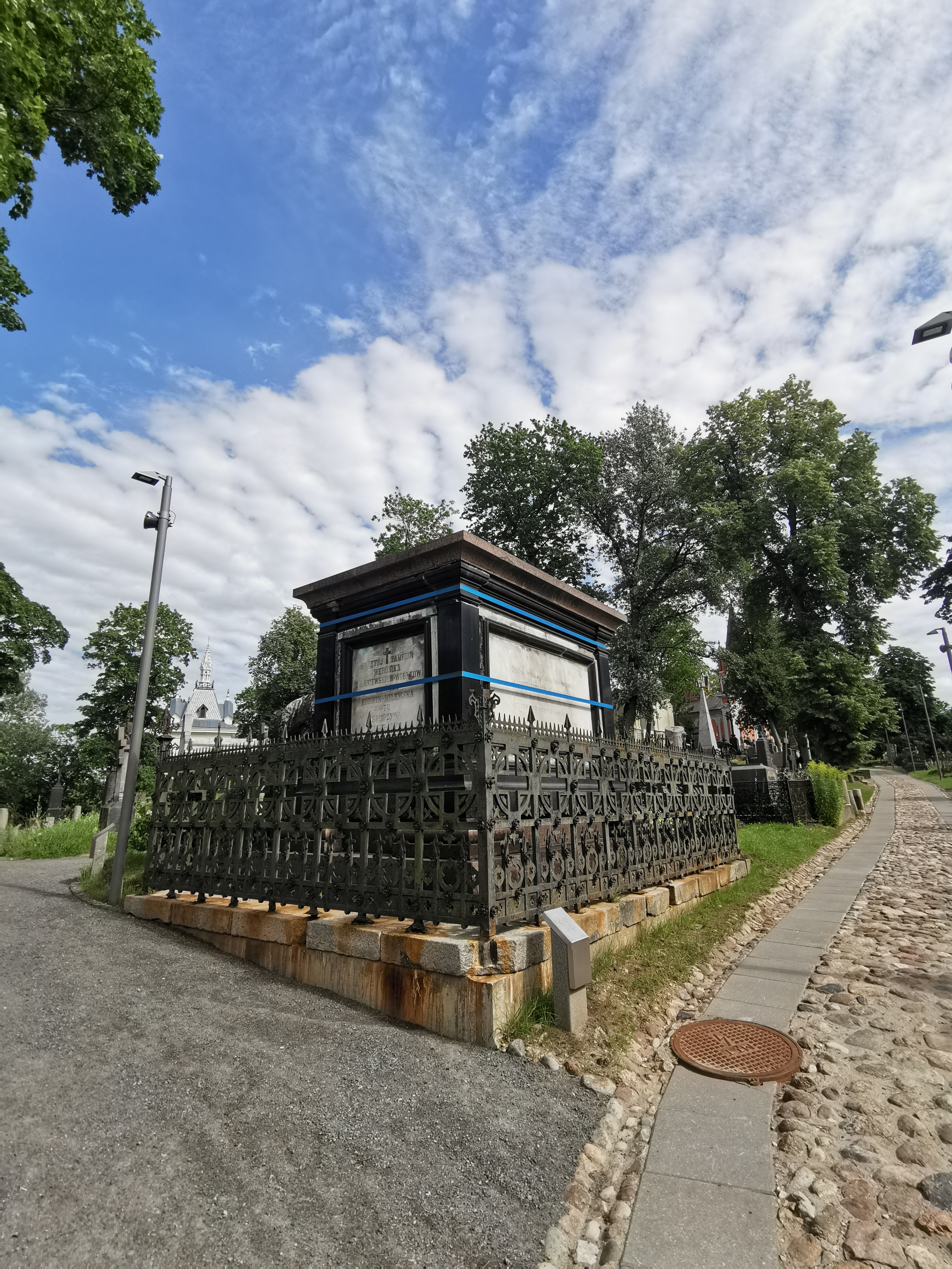 Grafų Korvin Milevskių koplyčia